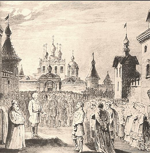 Эскиз декораций к опере "Псковитянка"